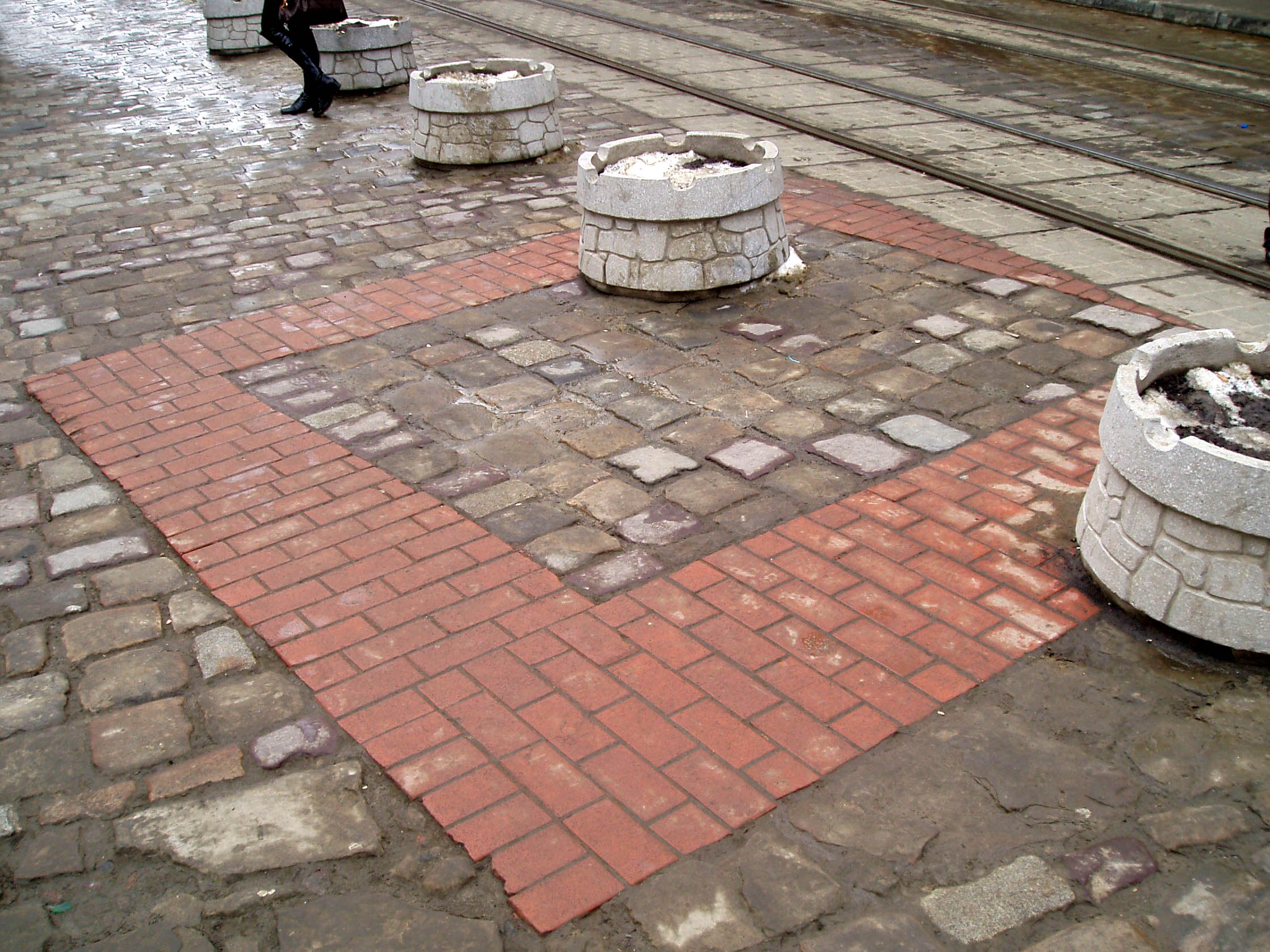 Трасування на дорожньому покритті фундаментів віднайденої археологами готичної каплиці у Львові на площі Катедральній.